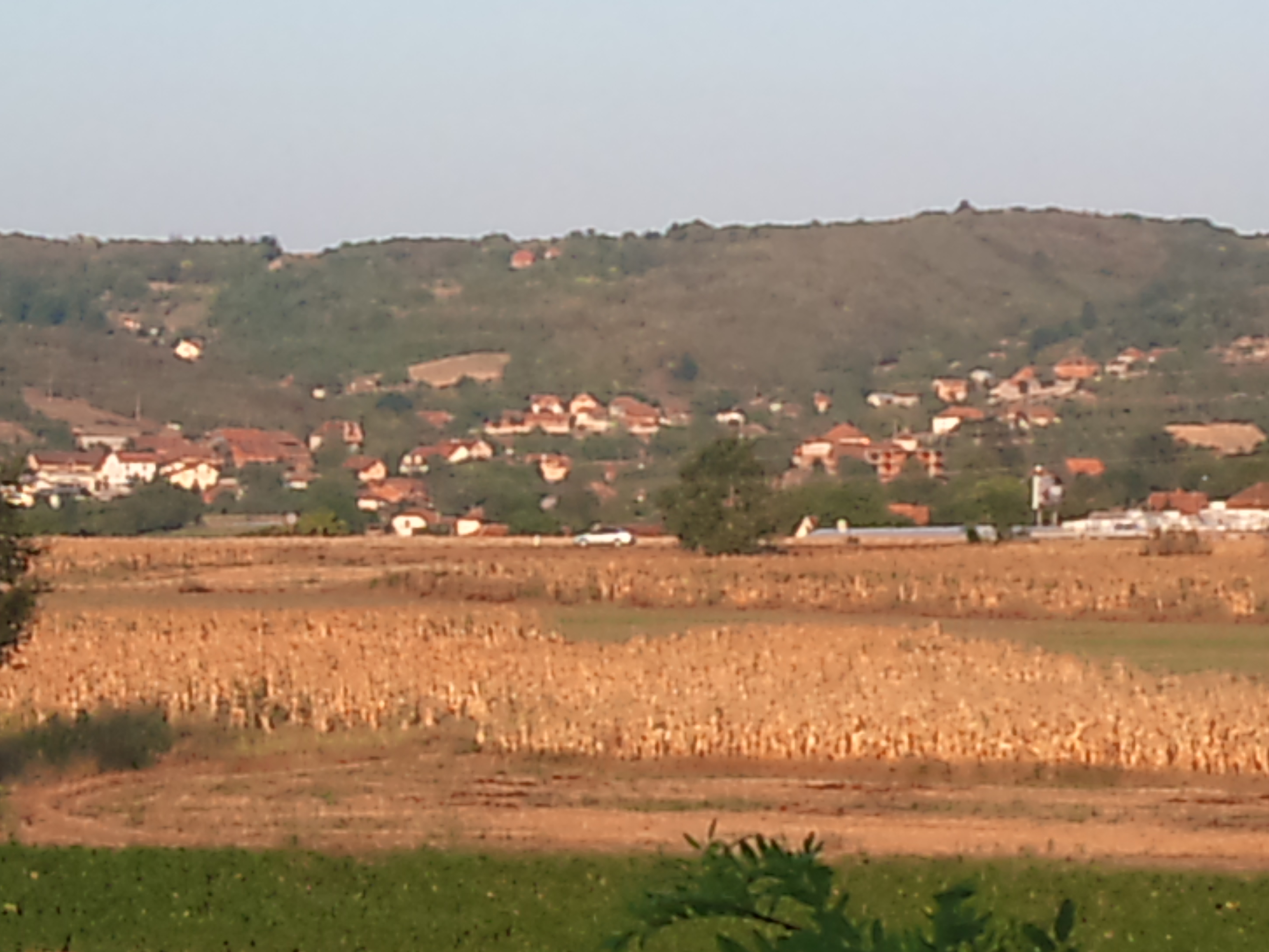 Pogled na Žirovnicu